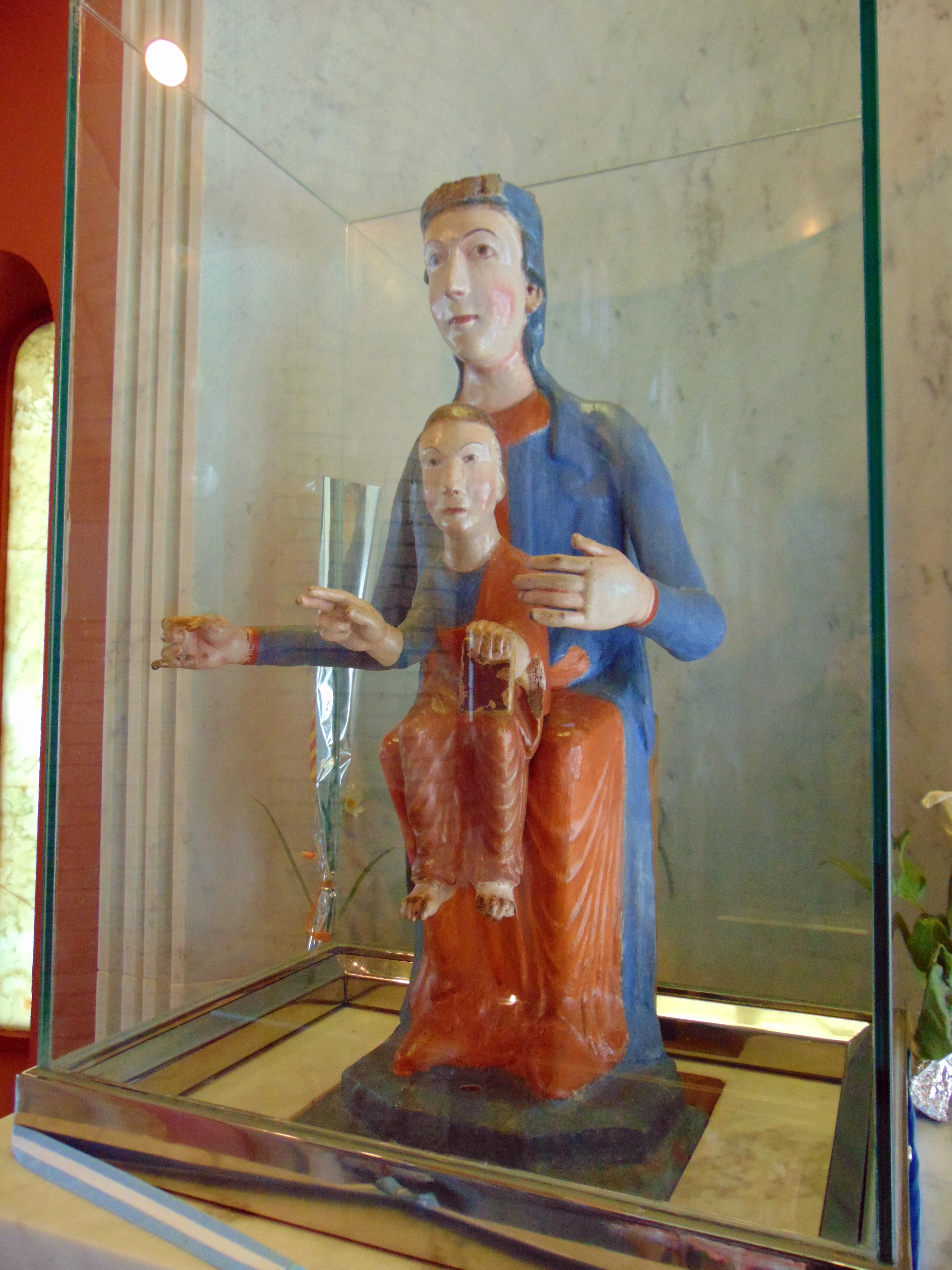 Església Nova de Santa Maria del Collell (Sant Ferriol)